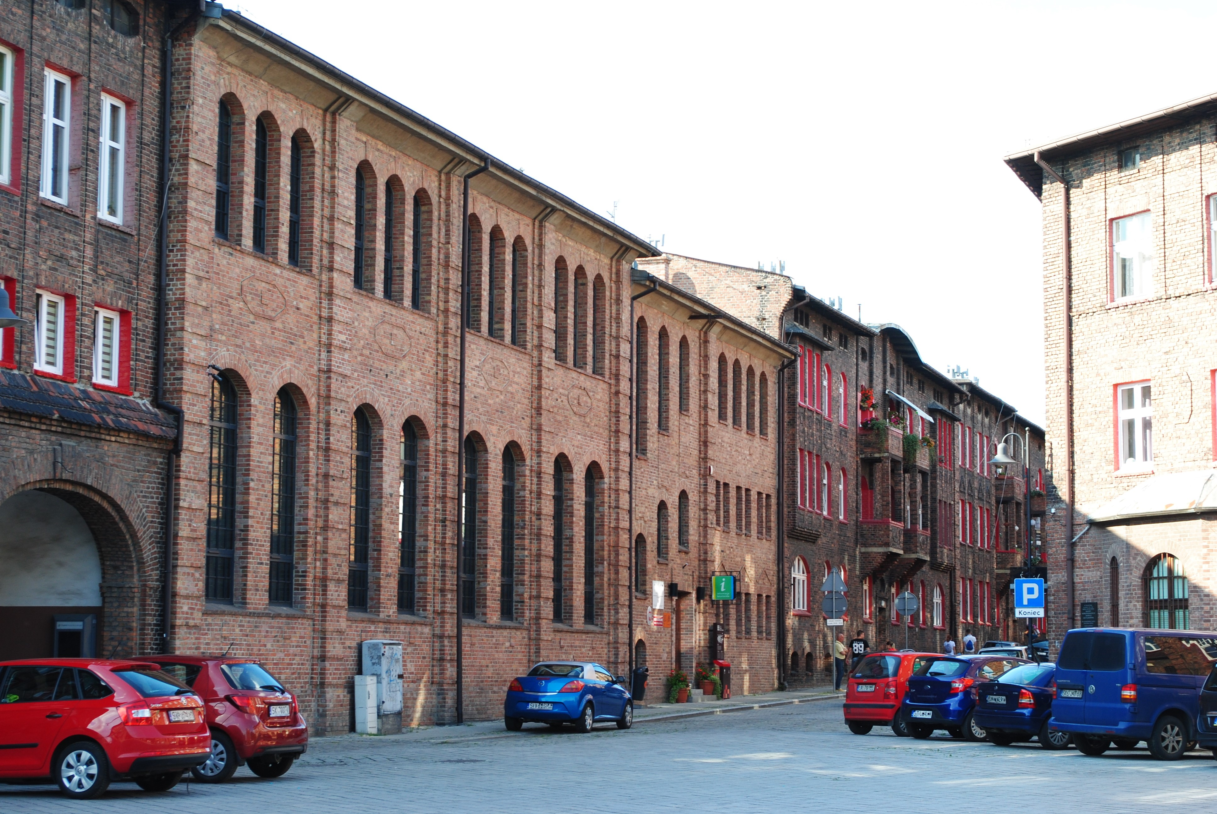 Katowice - Janów-Nikiszowiec. Dział Etnologii Miasta Muzeum Historii Katowic